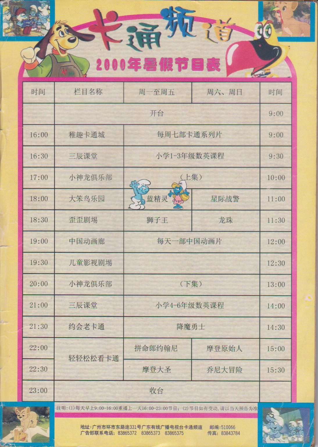 粵語: 2000年暑假嘅南方少兒（今日嘅廣東少兒）頻道播出嘅節目表